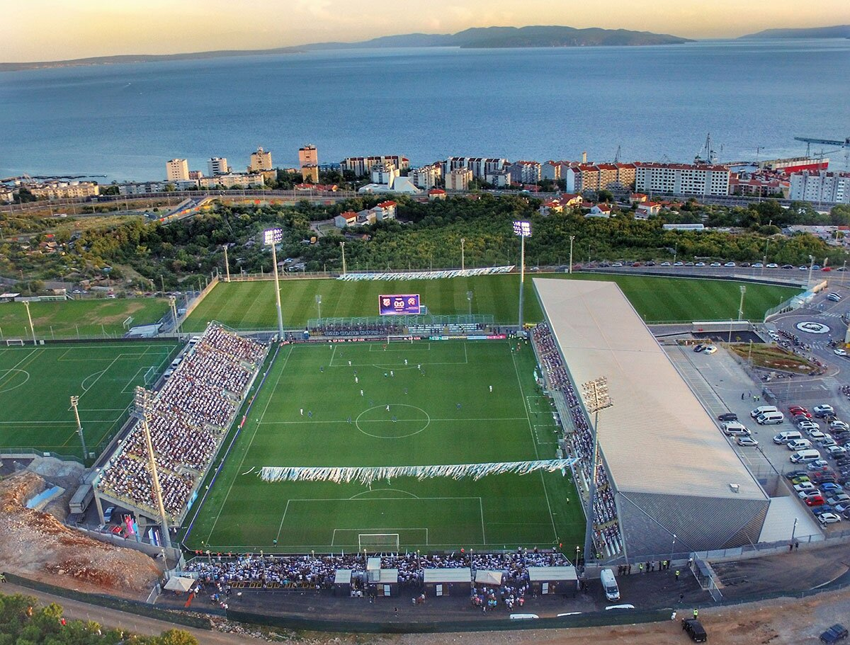 Rujevica stadium, Rijeka, Croatia